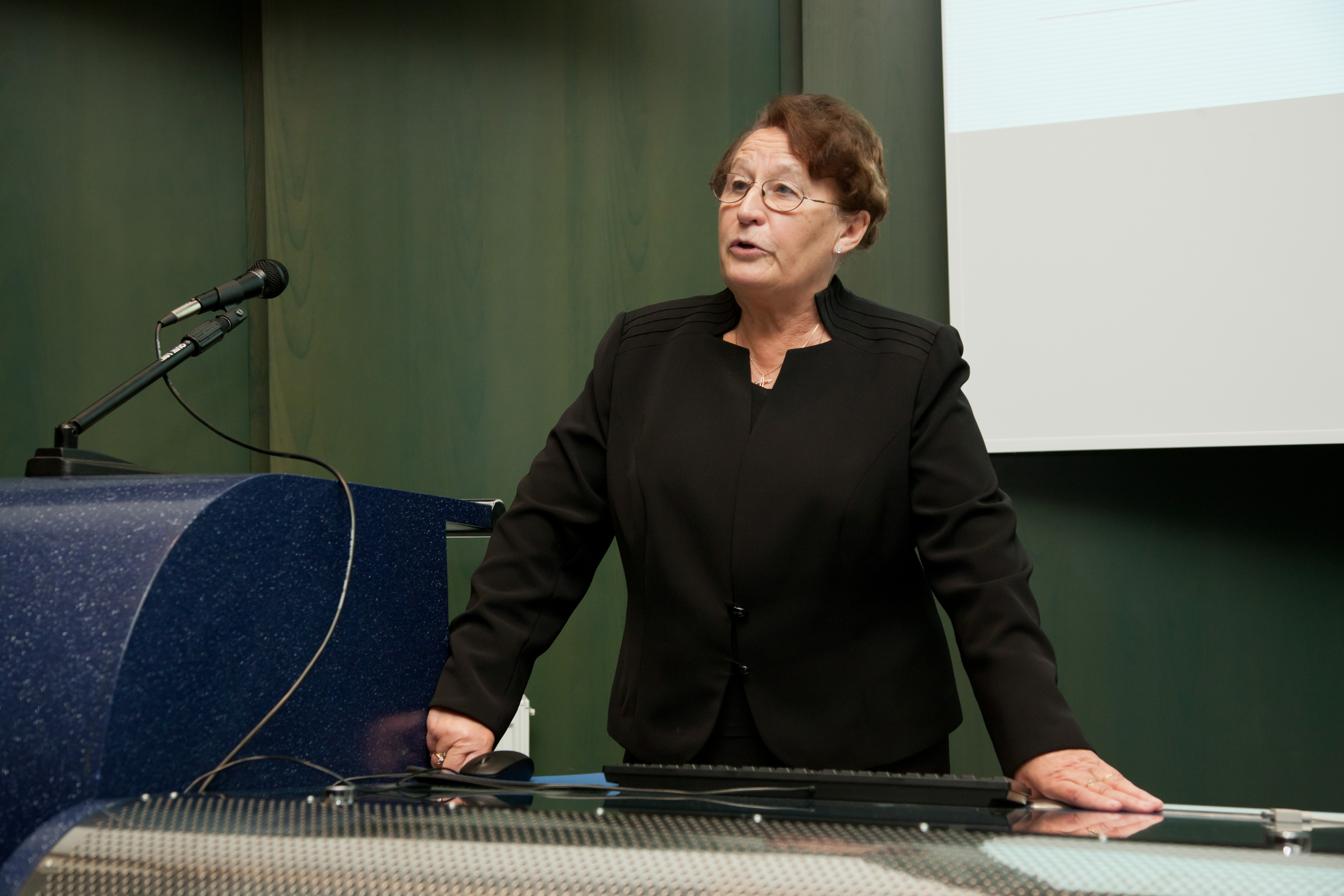 TÜ arstiteaduskonna aastapäeva üritused 13. ja 14. oktoobril 2011. Teaduskonverents Biomeedikumi auditooriumis 1006 (Ravila 19, Tartu) 13. oktoobril. Pildil emeriitprofessor Helgi Silm pidamas akadeemilist loengut teemal „Dermatoloogia 21. sajandil“.